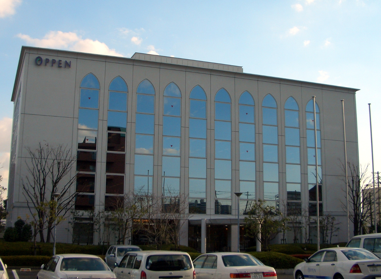 Oppen in Suita city,Osaka,Japan.